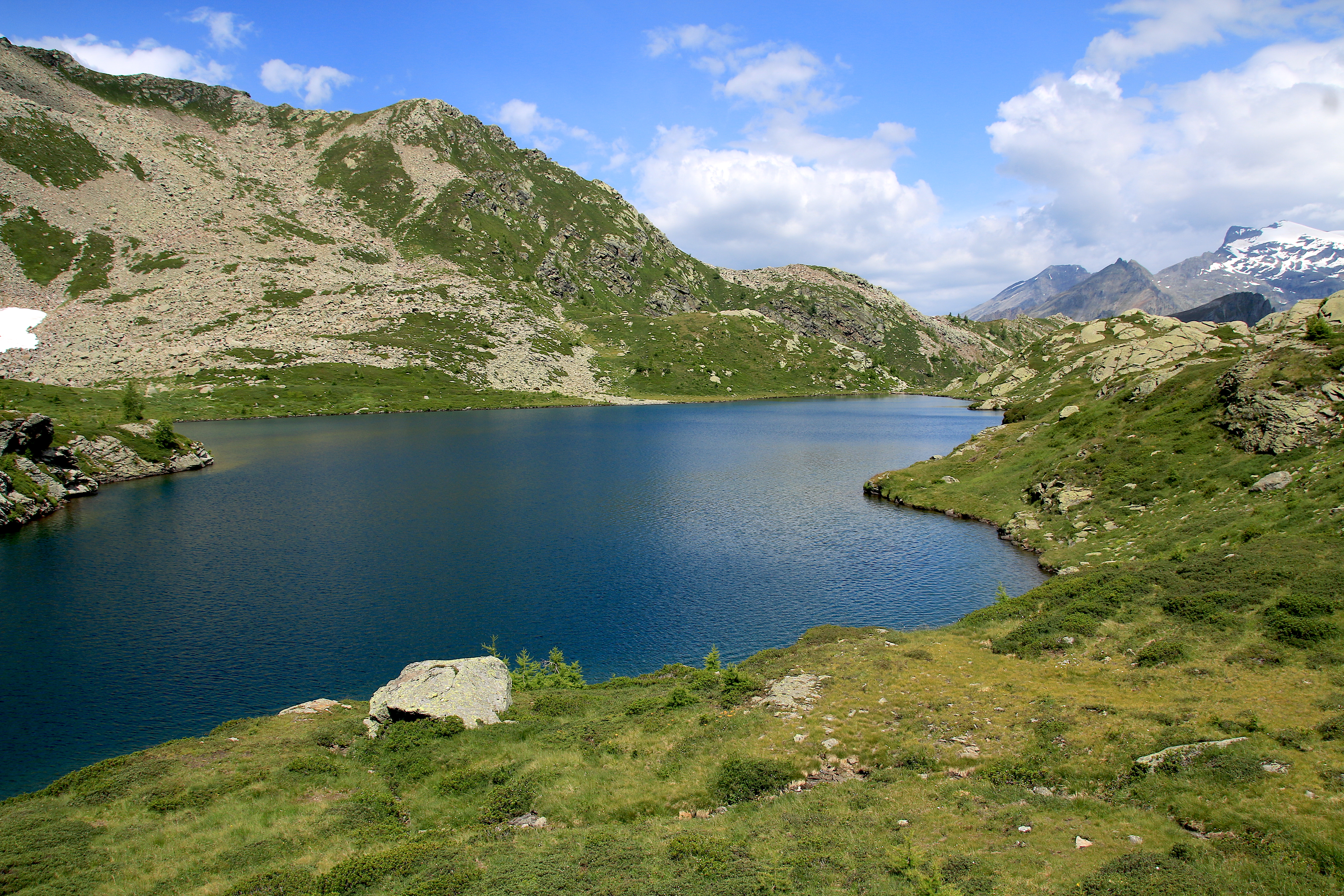 Tschawinersee im Juli